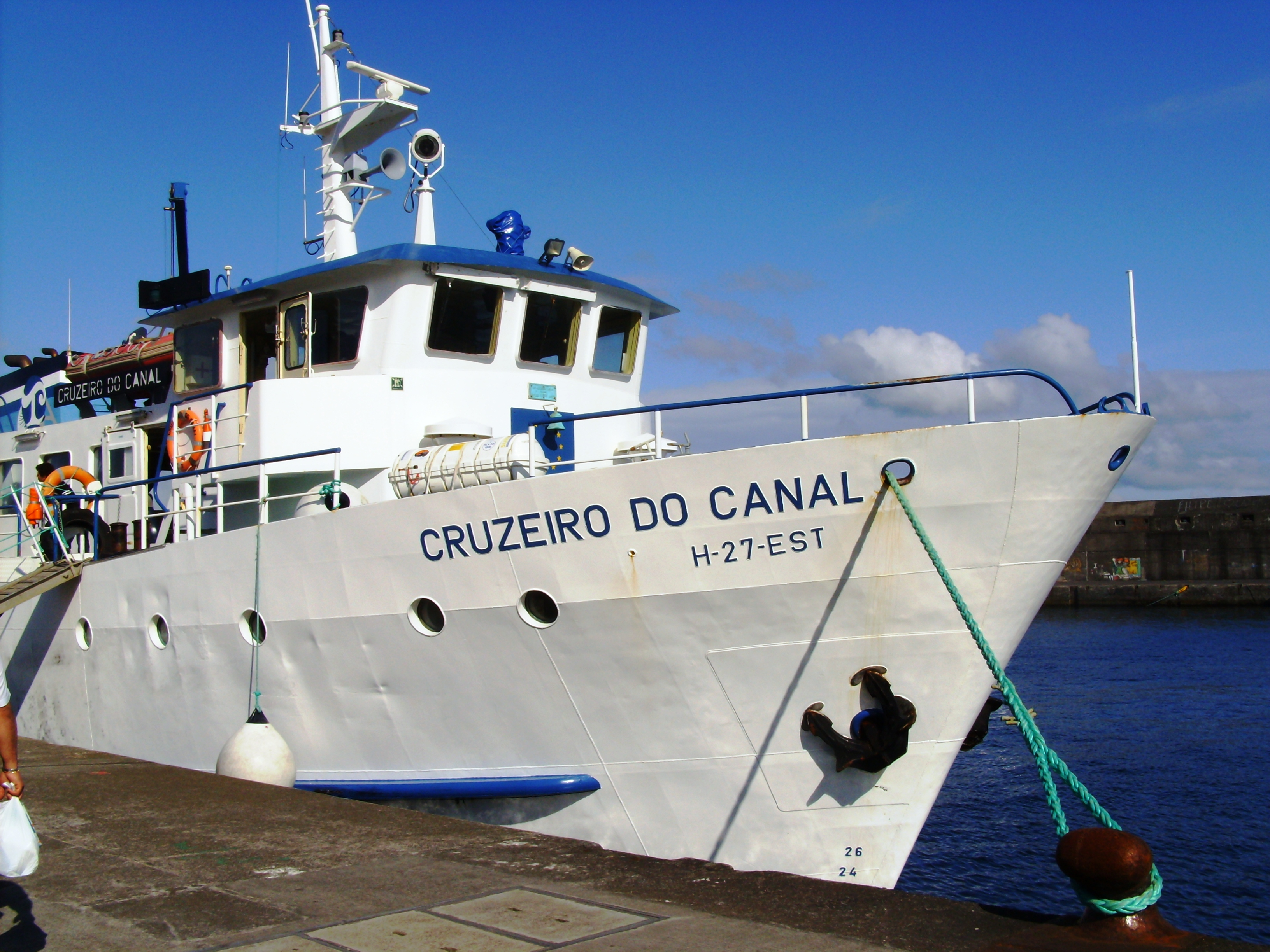 "Cruzeiro do Canal", cais da Madelena do Pico, ilha do Pico, Açores.